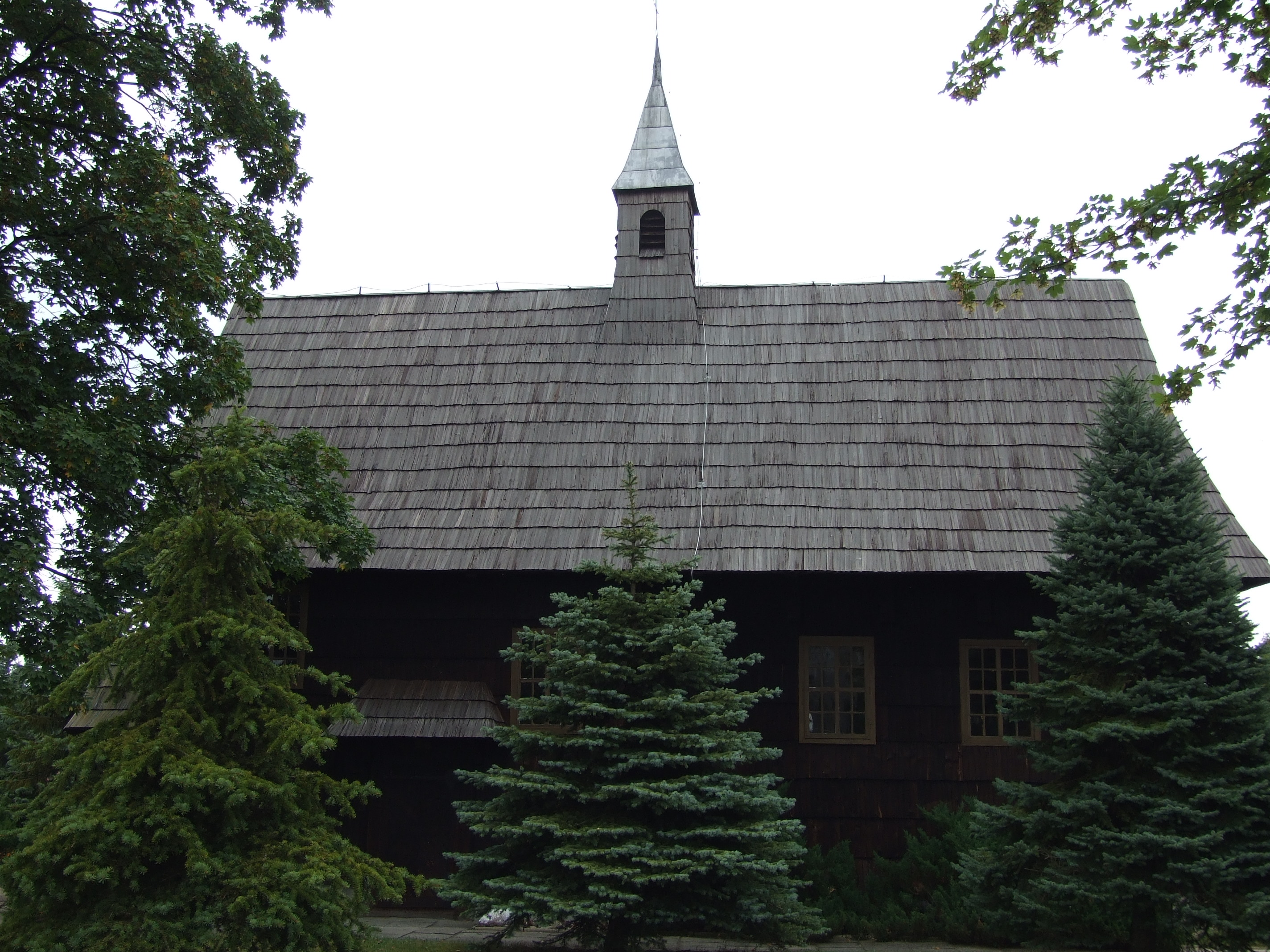 Kościół św. Antoniego z Padwy w Sowczycach